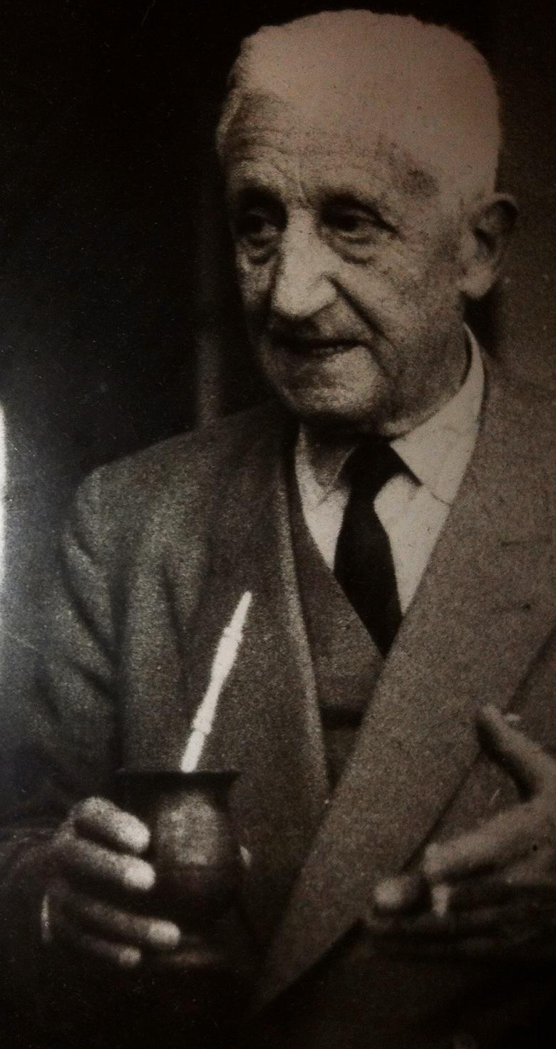 El ex-presidente de Argentina, Arturo Illia, en la Provincia de Misiones con un mate en una mano.